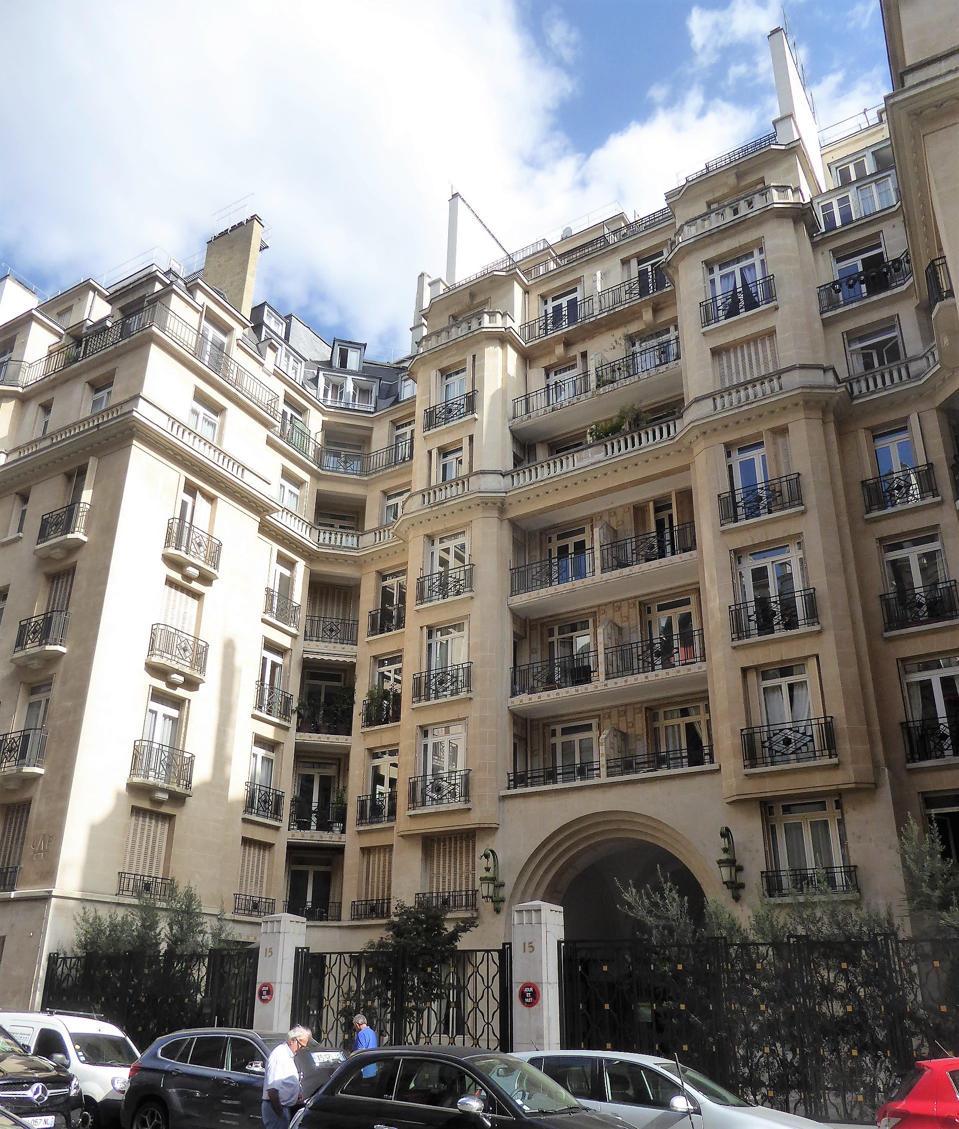 Rue Raynouard 15 M. Julien L. Duhayon 1931